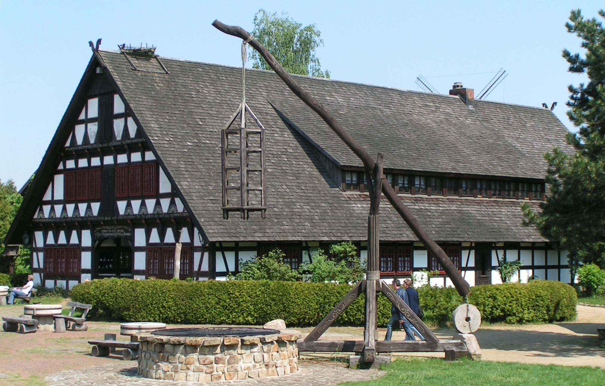 Dorfplatz mit Bäckertaufe im Internationalen Mühlenmuseum Gifhorn